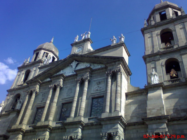 Fachada de la catedral de Toluca